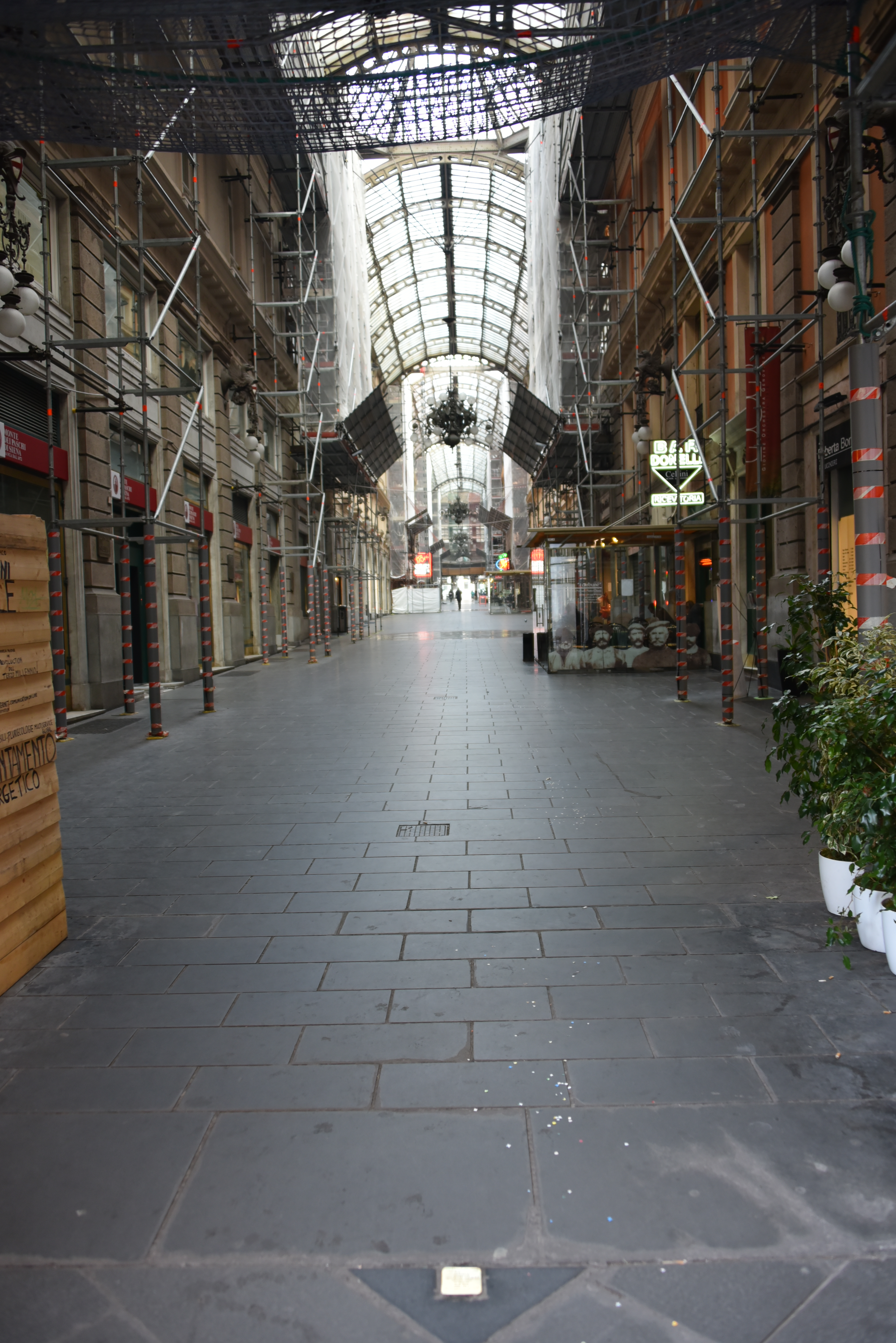 Stolperstein in Genova